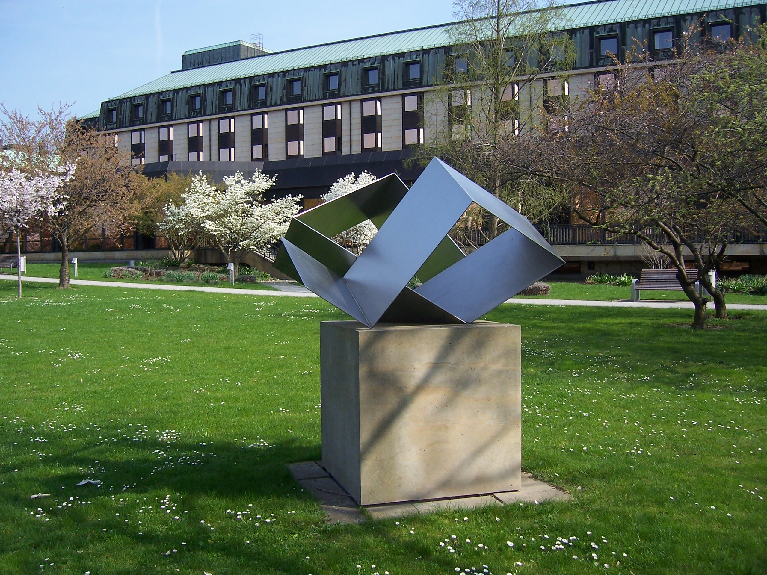 Die Plastik Gebrochenes Band von Hermann Glöckner im Garten des Hotel Bellevue in Dresden.